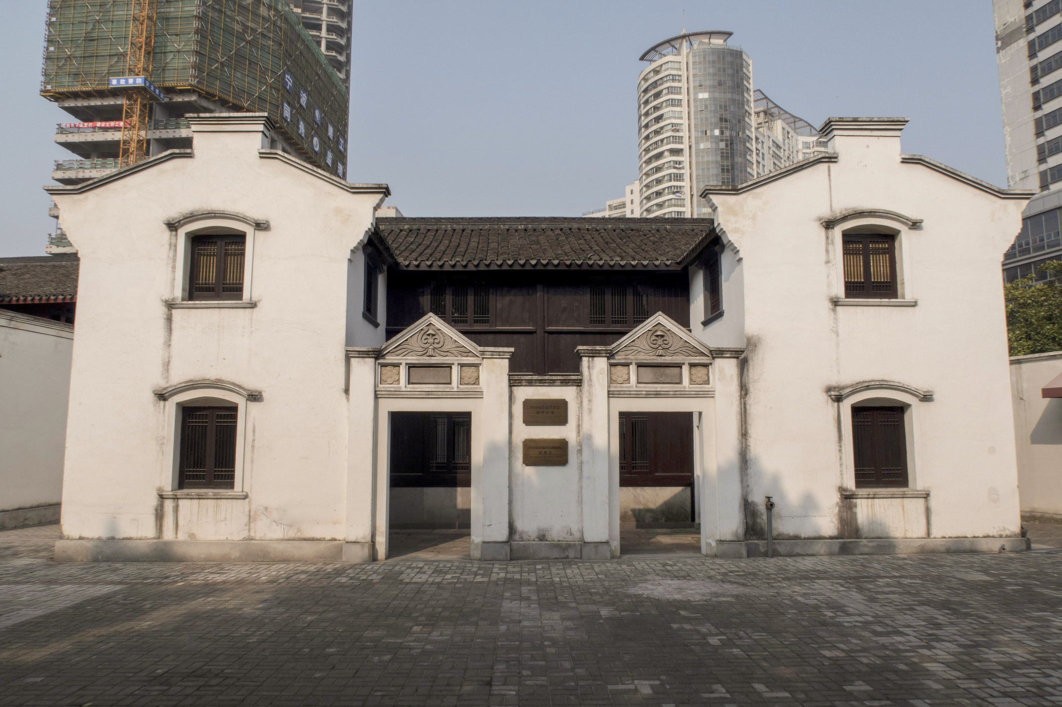 宁波中马街道近代石库门建筑群